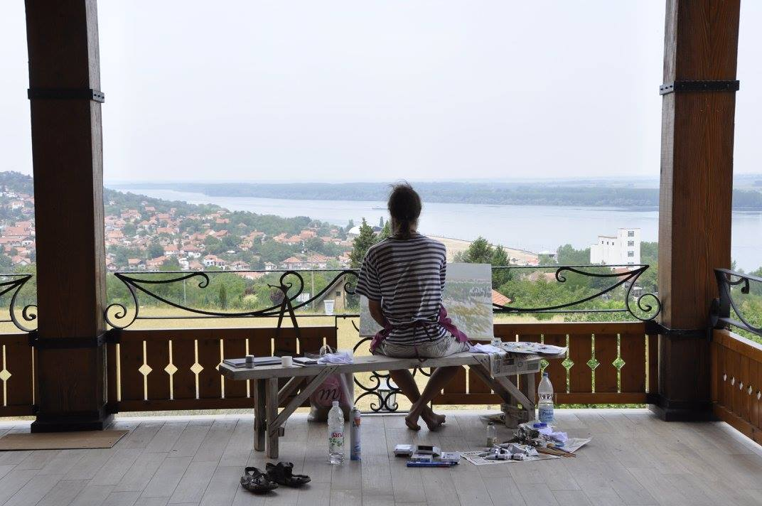 Предраг Лојаница, доктор уметности. Фото:Зорица Атић 8по одобрењу).